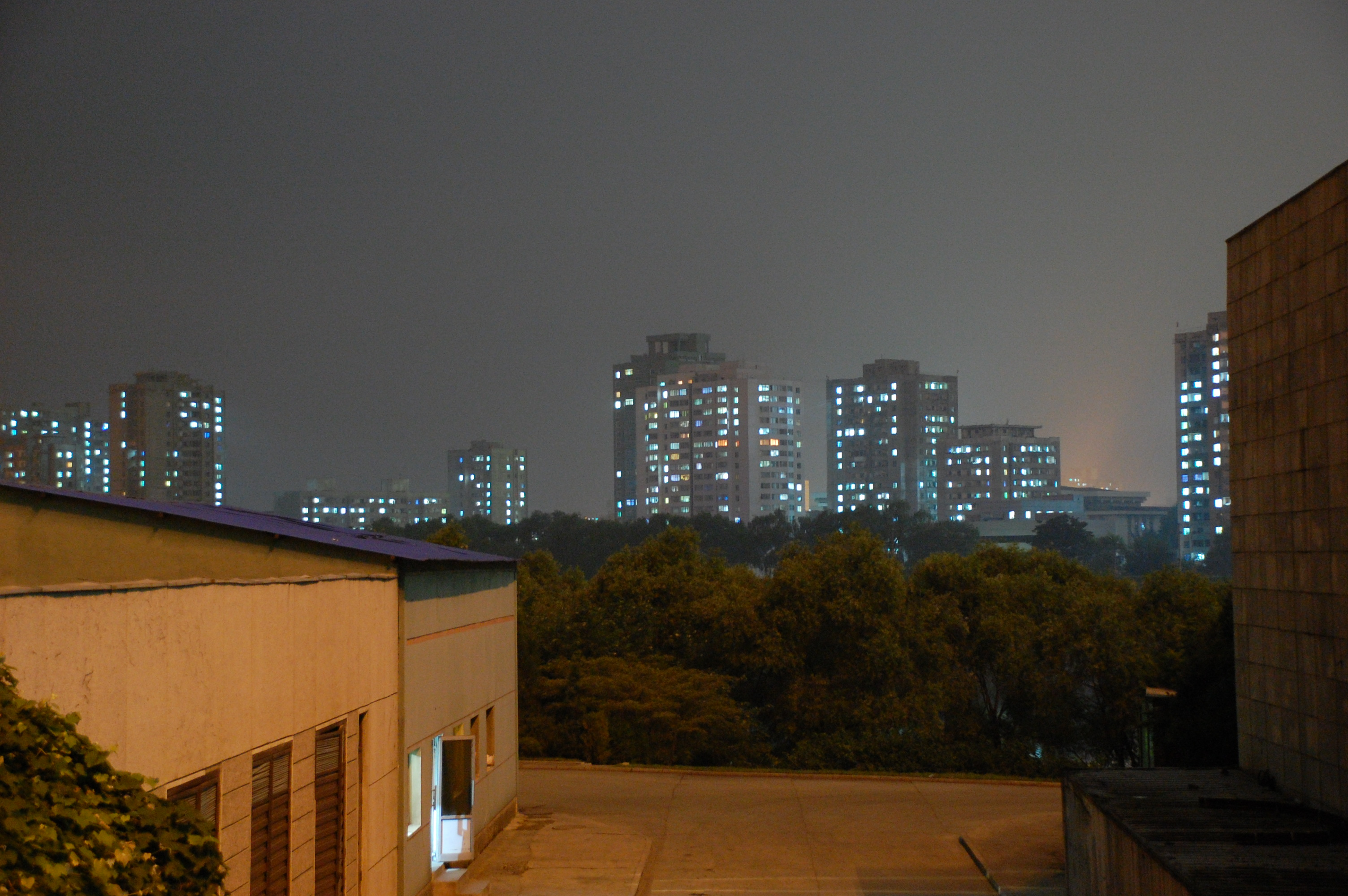 North Korea — Pyongyang